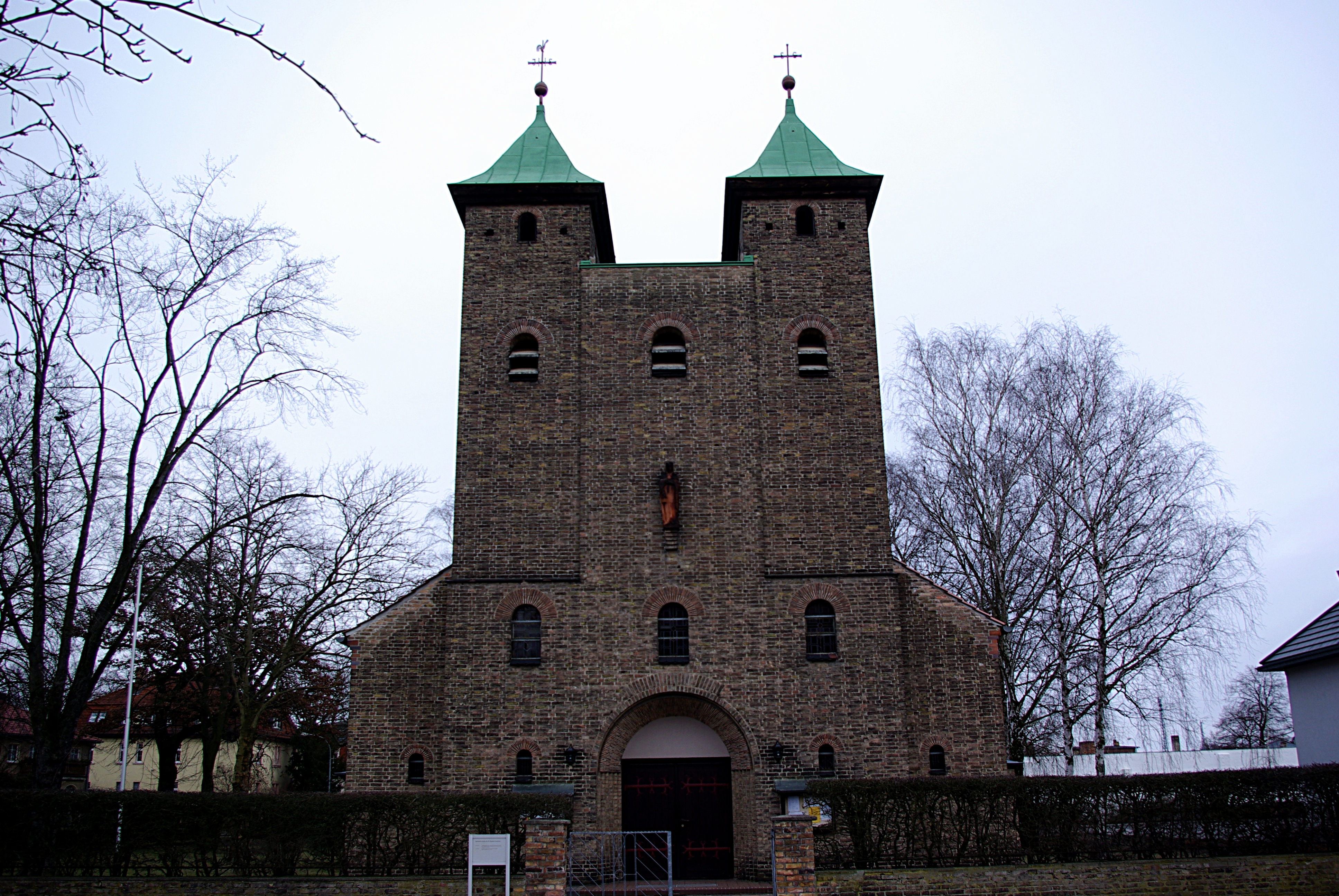 Königs Wusterhausen in Brandenburg. Die katholische Kirche St. Elisabeth steht unter Denkmalschutz.